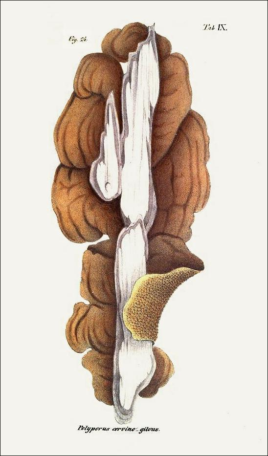 Abbildung aus: Praemissa in floram cryptogamicam Javae Insulae.